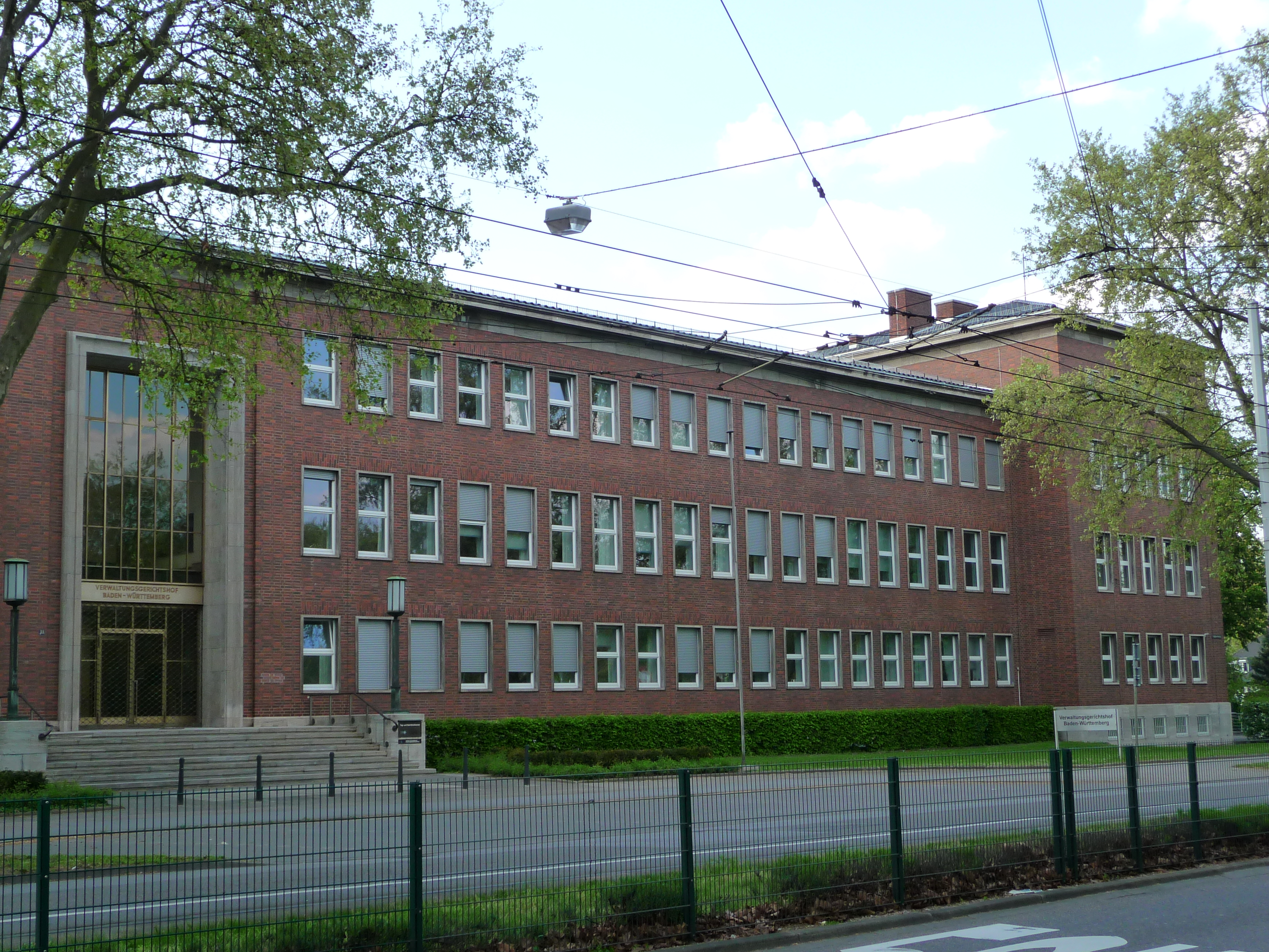 Gebäude des Verwaltungsgerichtshofs Baden-Württemberg in Mannheim (Baden-Württemberg, Deutschland)